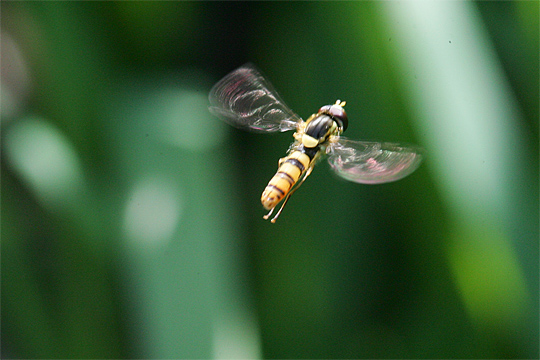 Episyrphus balteatus (ホソヒラタアブ)flying #2